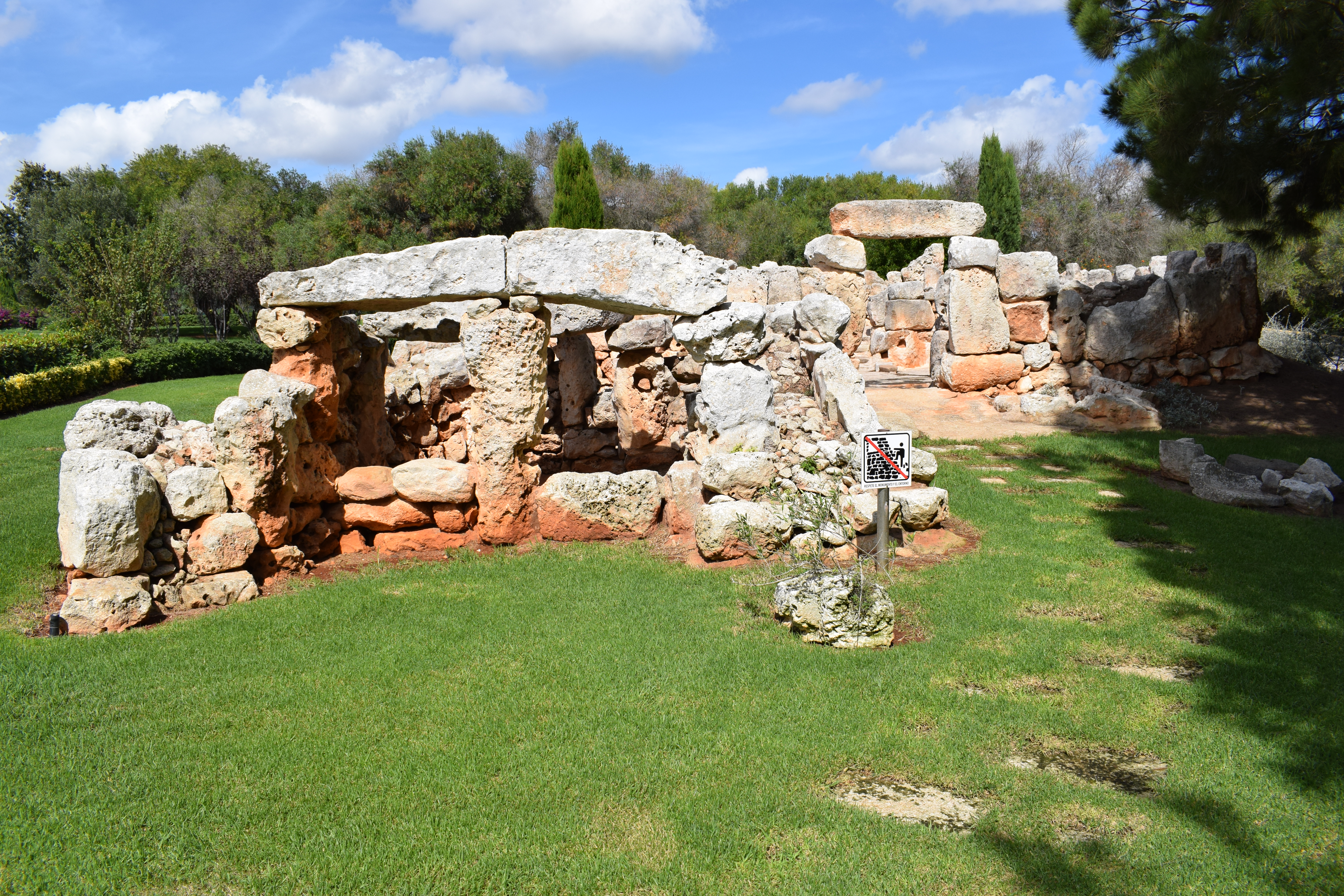 Talayotisches Haus von Biniparratx Petit, Flughafen Menorca, Sant Lluís: Gesamtansicht.